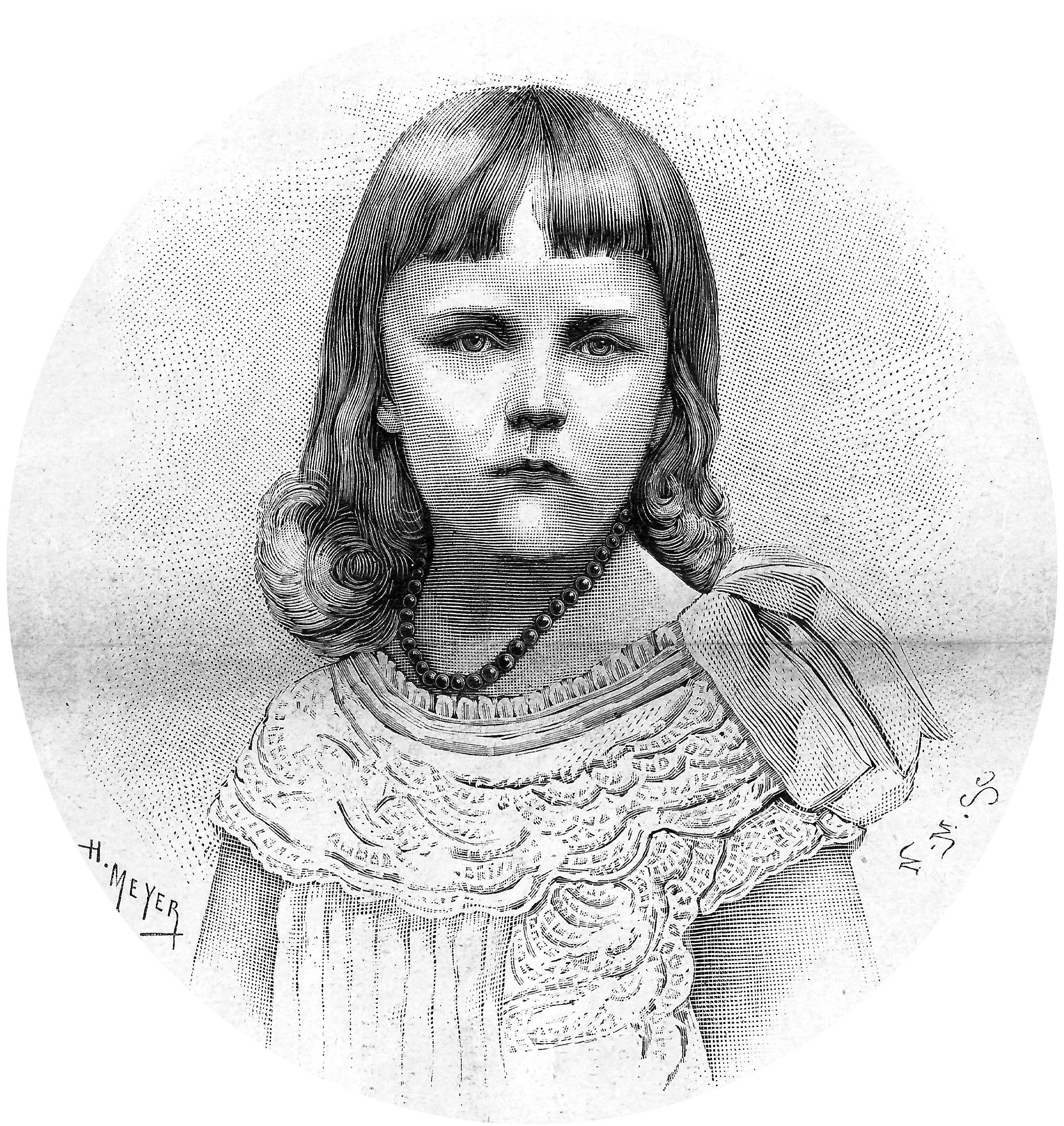 S.A.I. et R. l’archiduchesse Élisabeth-Marie d’Autriche, fille de Stéphanie de Belgique et de Rodolphe d’Autriche. — Portrait publié à l’occasion du décès de Rodolphe, son père. La fille unique de Stéphanie et Rodolphe a environ 5 ans sur cette gravure.